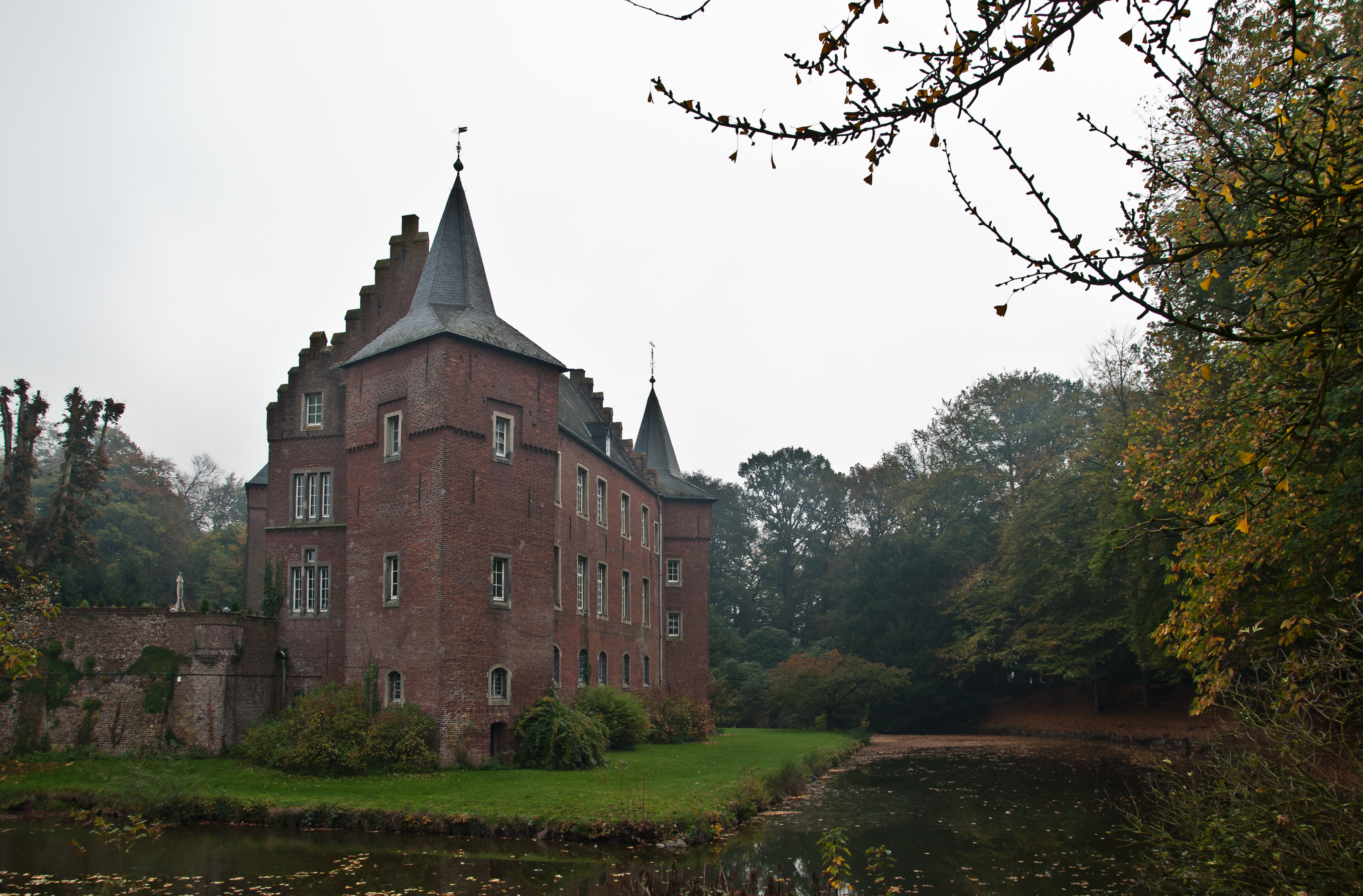 Hauptburg Schloss Elsum vom Zufahrtsweg aus gesehen